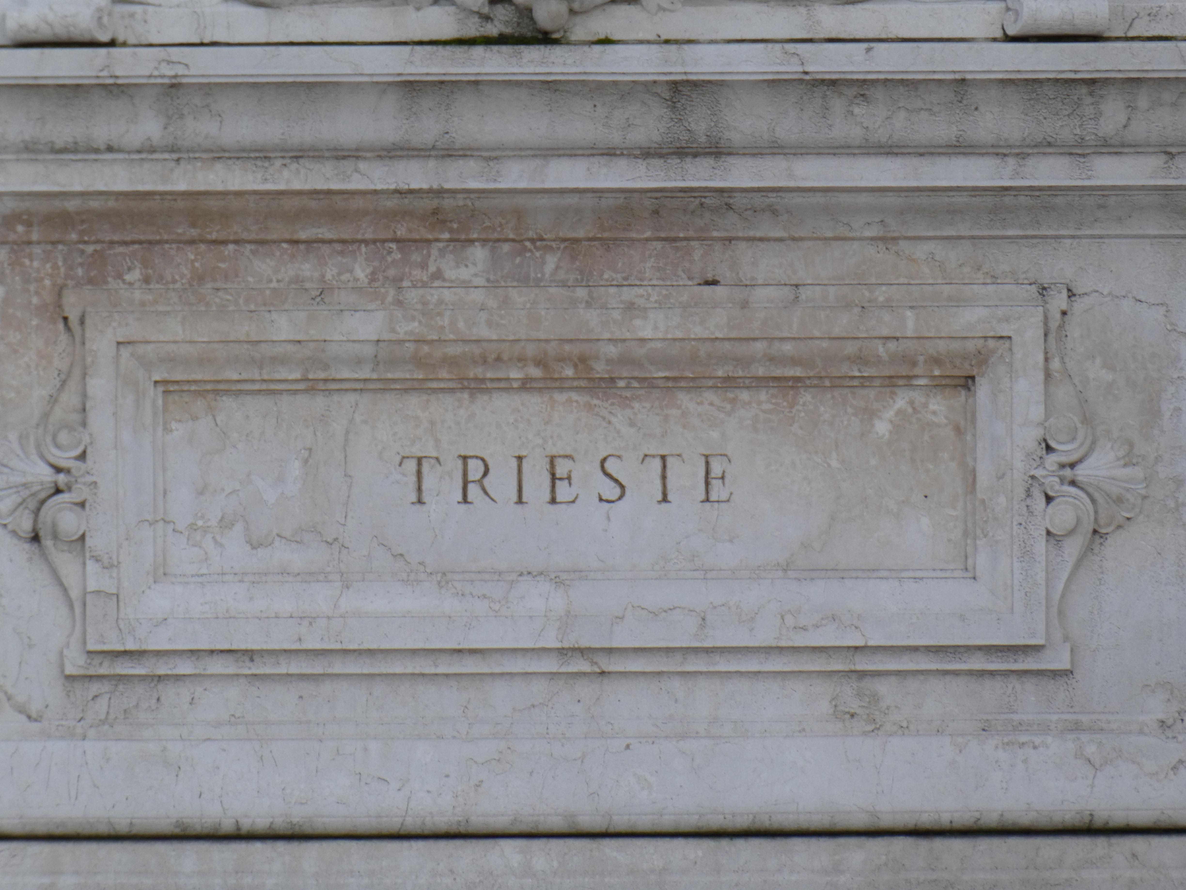 vedi titolo